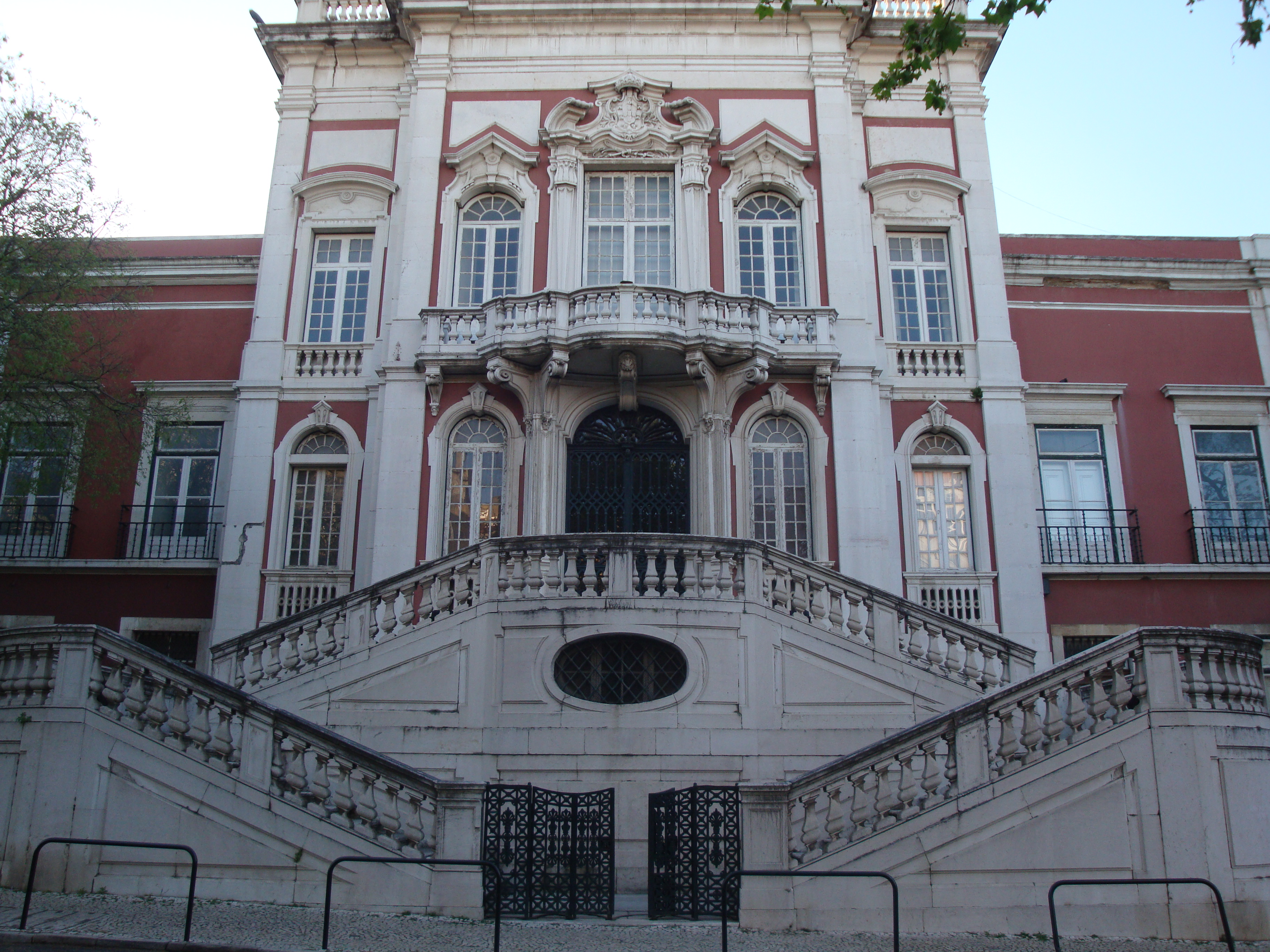 Frontaria da Capela do Paço da Bemposta